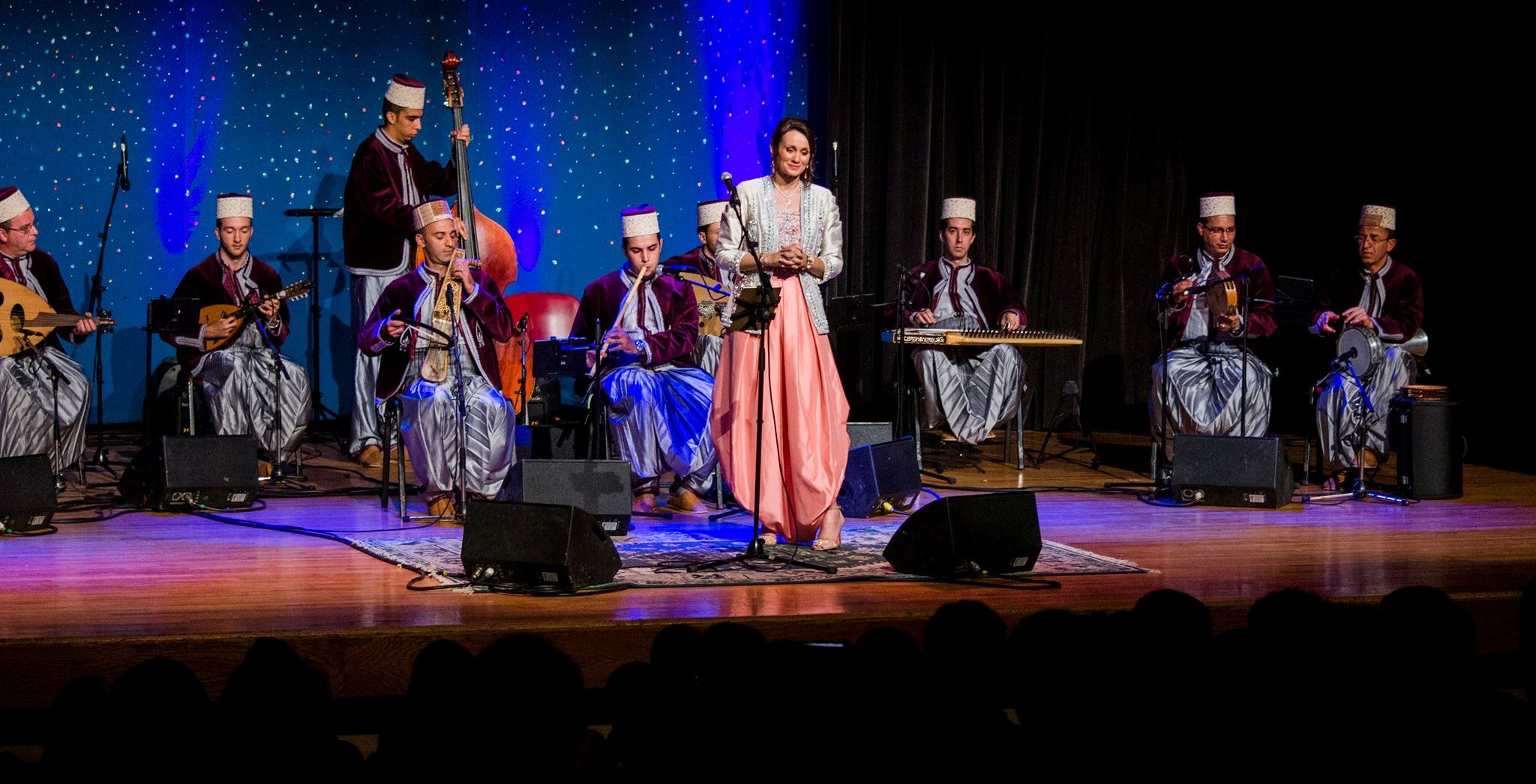 En concert